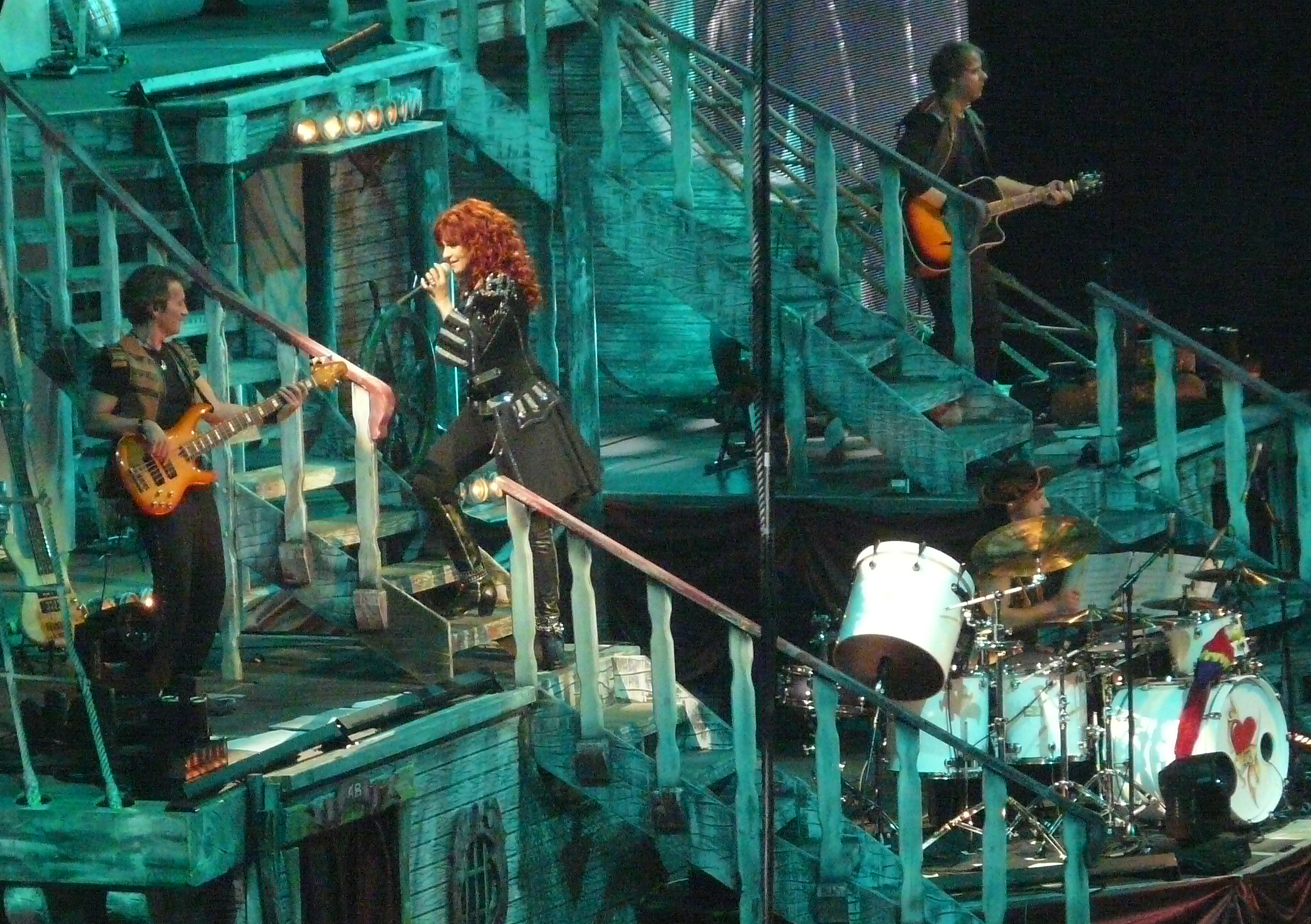 Andrea tijdens haar 2e concert Abenteuer in Köln - 14 januari 2012